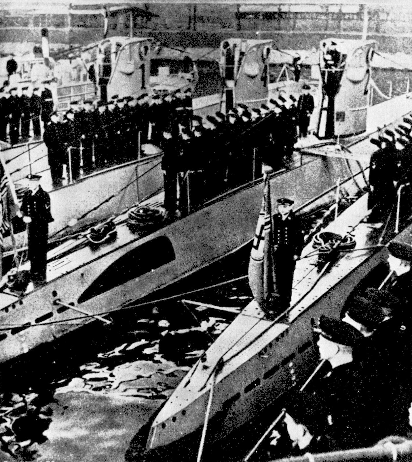 Nowe łodzie podwodne podczas ceremonii przekazywania ich niemieckiej marynarce wojennej